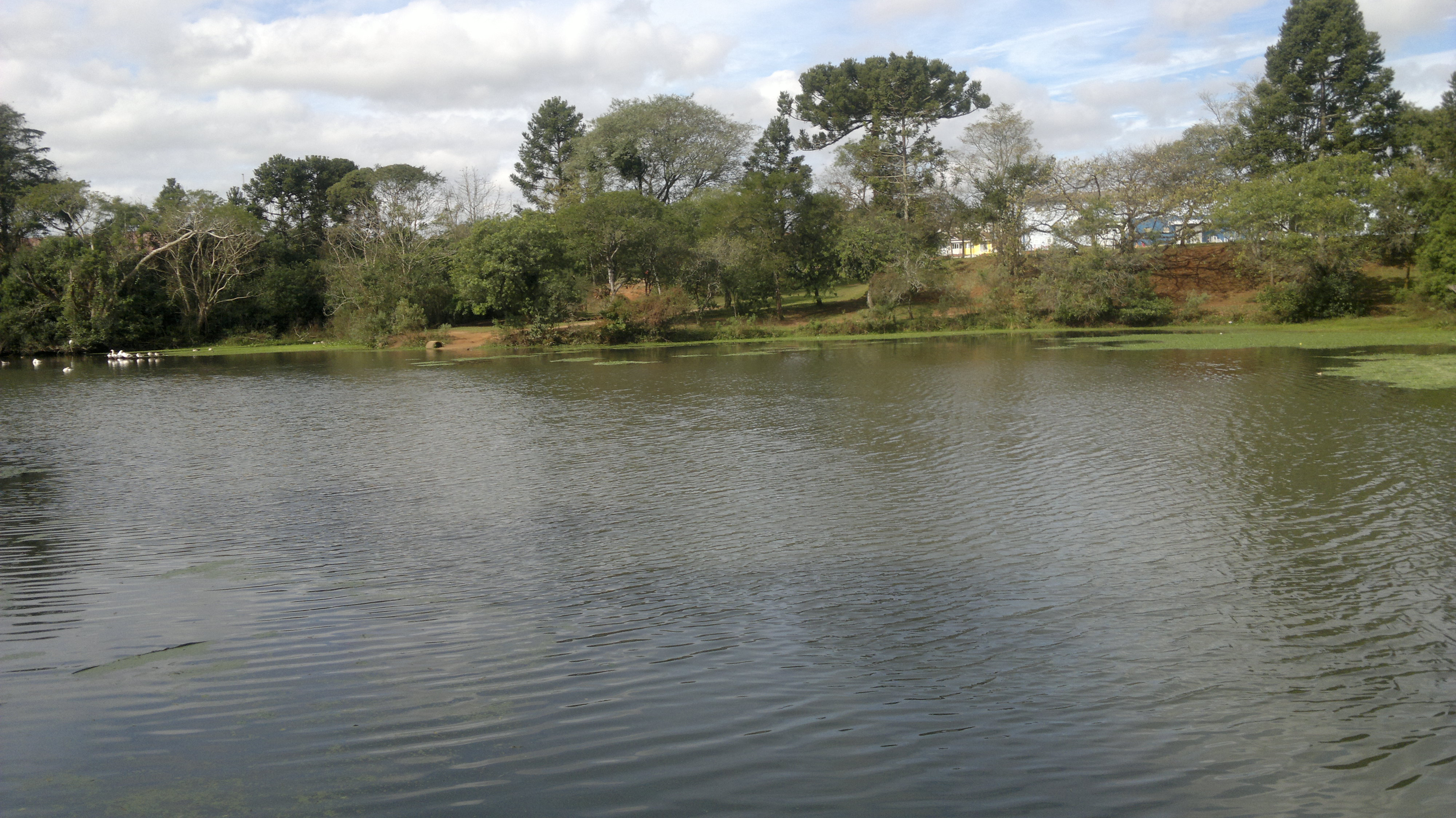 Vista parcial do Parque Cachoeira, localizado em Araucária-PR.